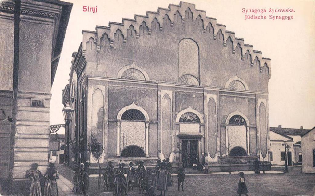 Большая синагога в Стрые, построена в 1817 г., восстановлена после пожара в 1886 г. Слева - фрагмент синагоги Маера Шулима.